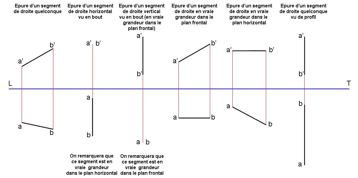 Les différentes représentations d'un segment de droite en géométrie descriptive